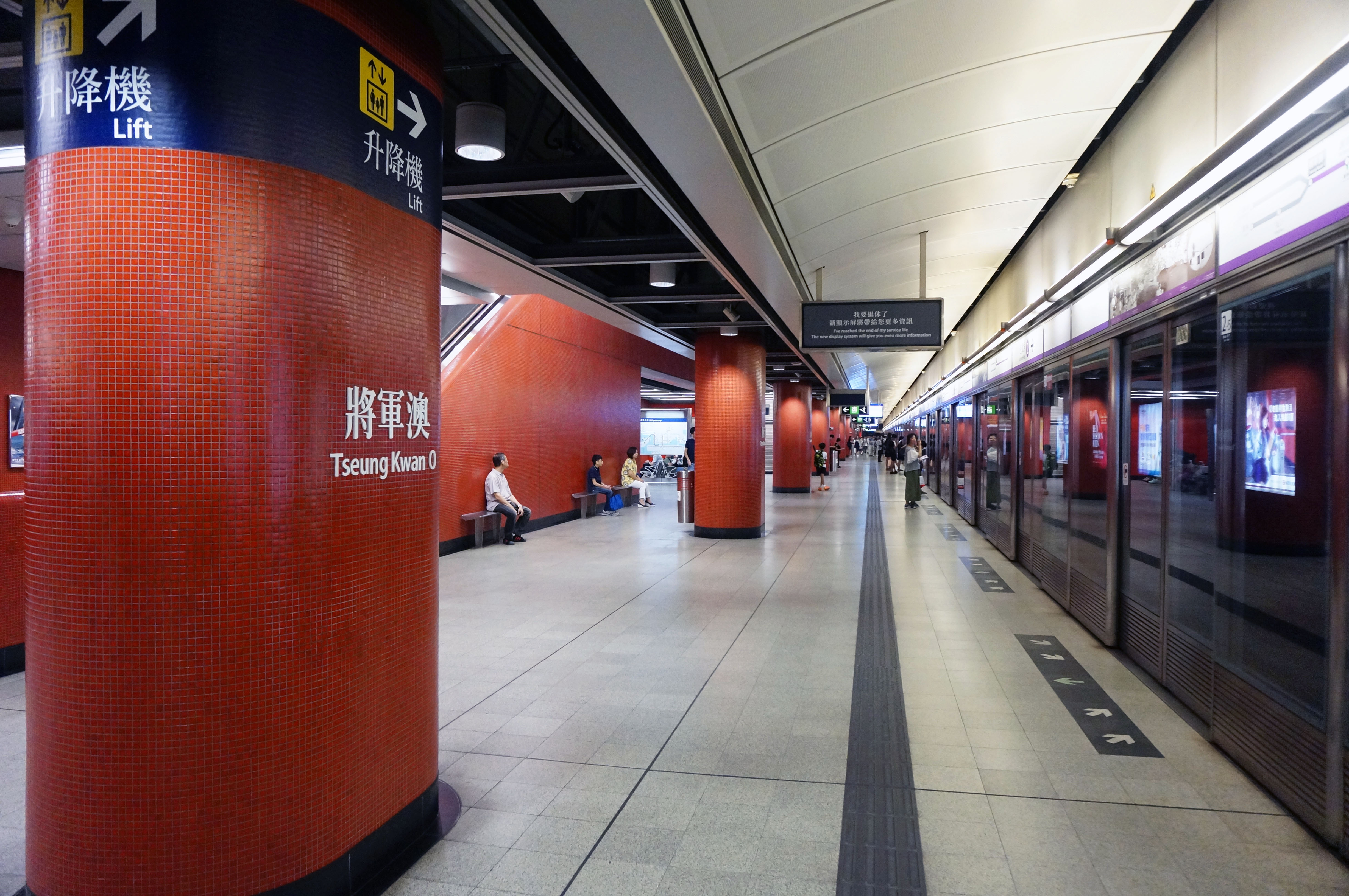 港鐵將軍澳站月台